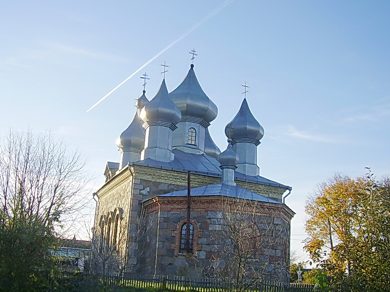 Старыя Габы. Свята-Мікалаеўская царква